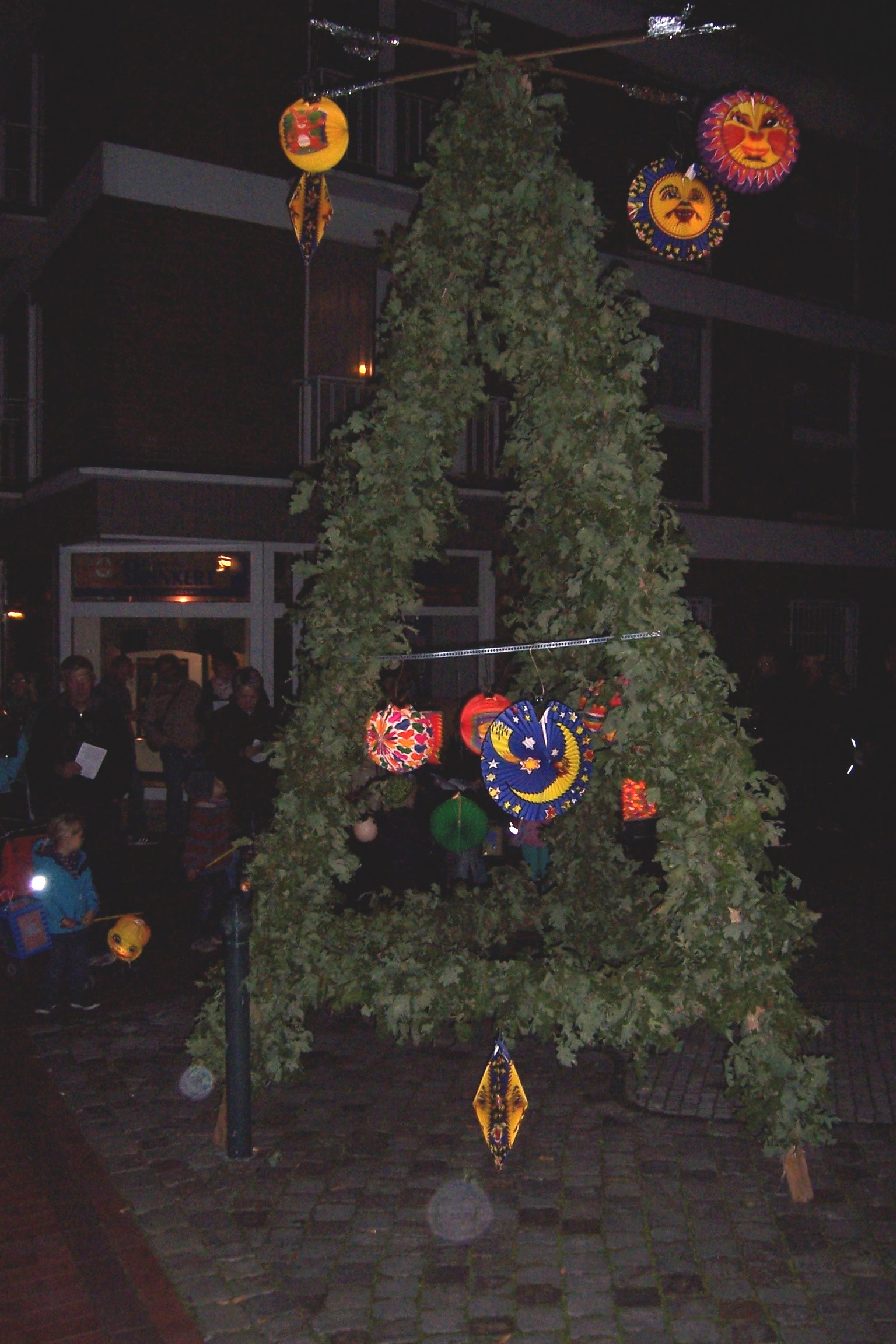 Lambertuspyramide Steinfurt-Borghorst, NRW, Germany.